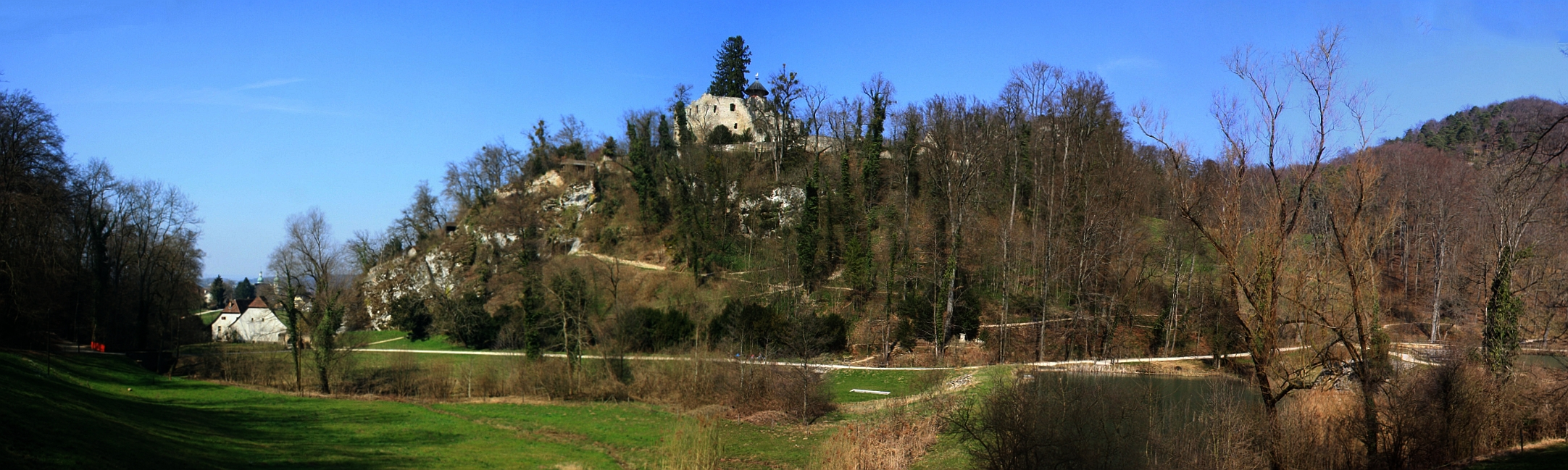 Ermitage Arlesheim, Basellland, Schweiz